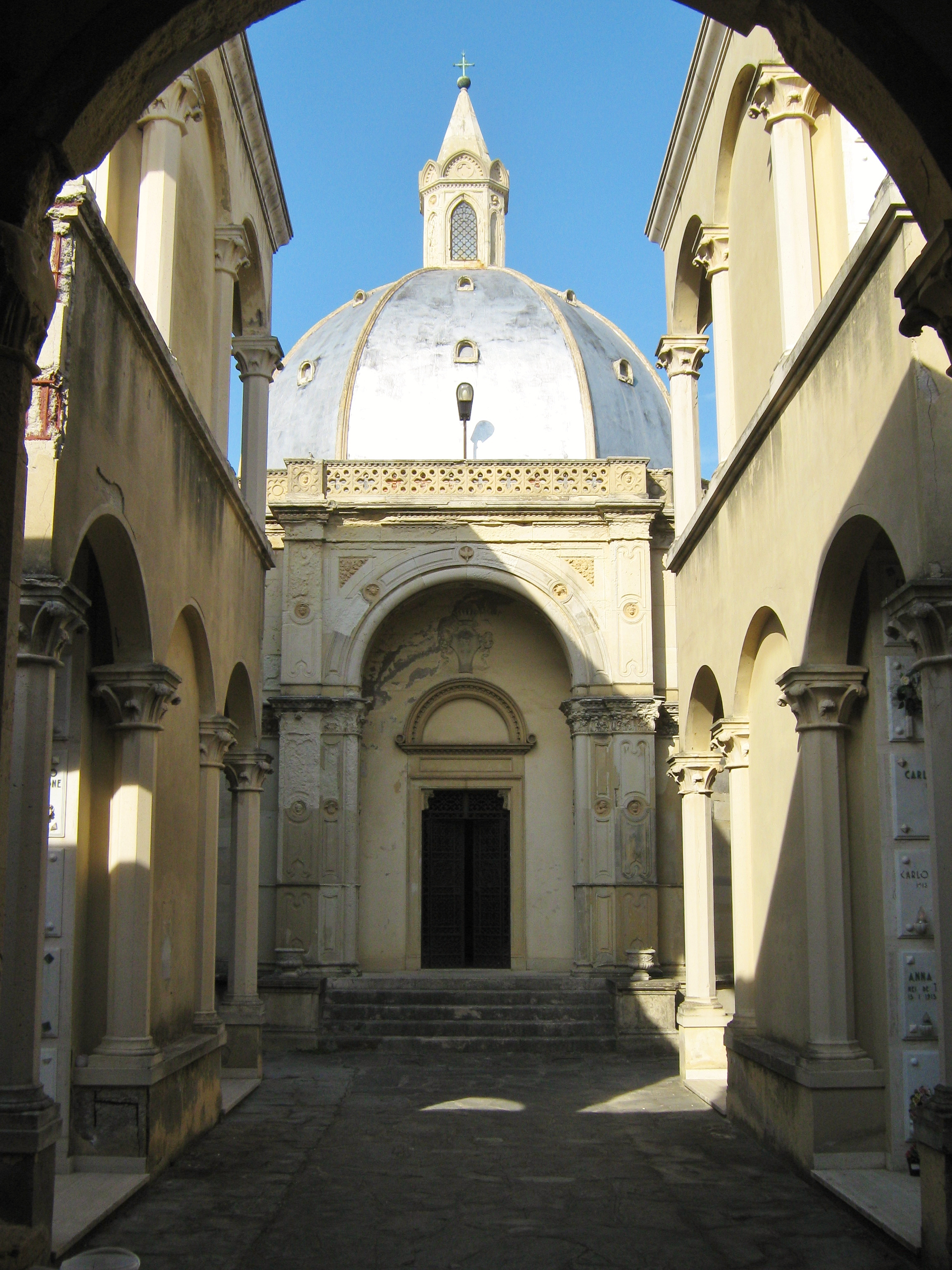 Livorno, cimitero della Misericordia: ex cappella Bastogi, opera di Dario Giacomelli.